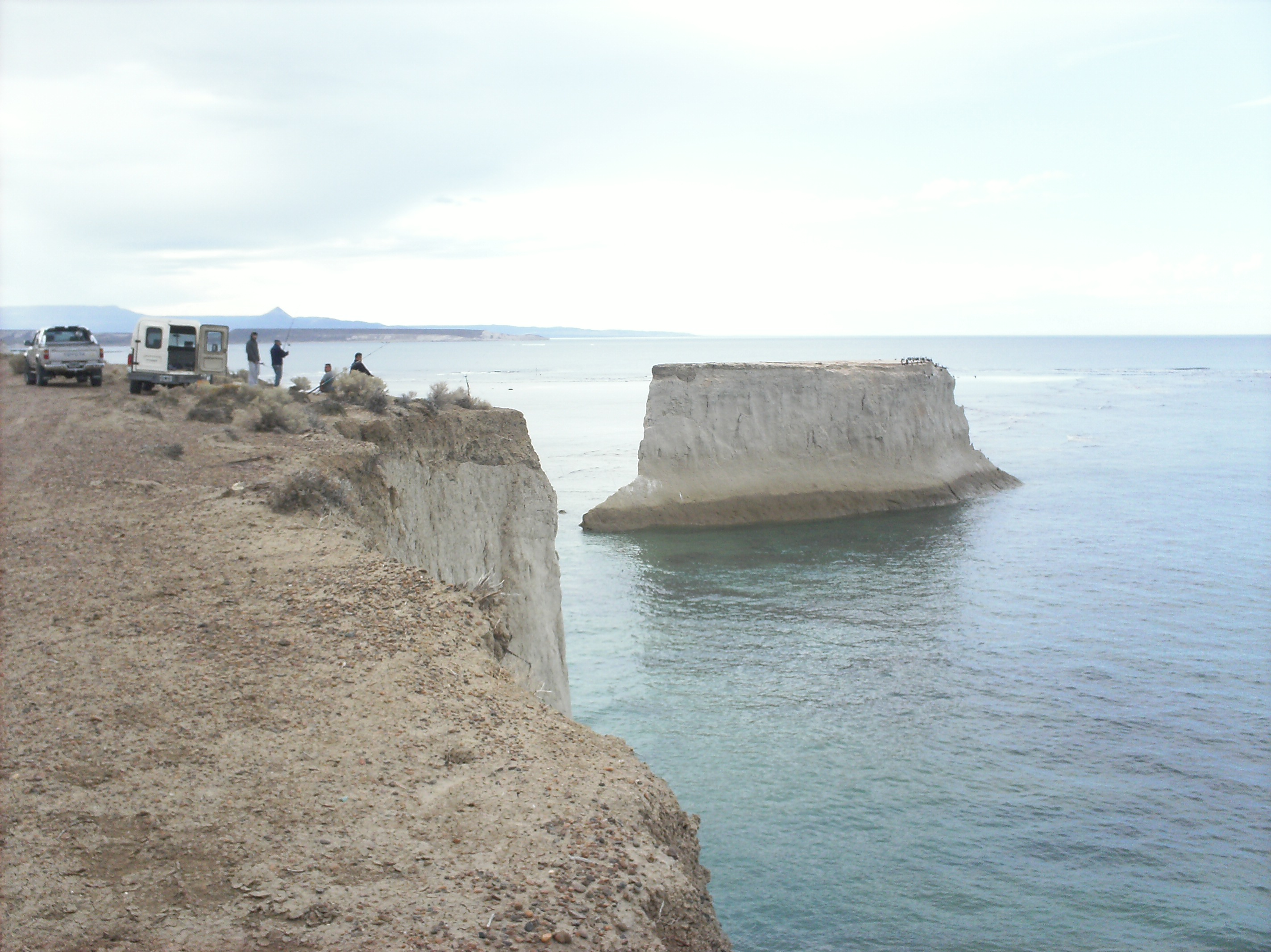 el farallon en inmediaciones del faro san jorge, comodoro rivadavia